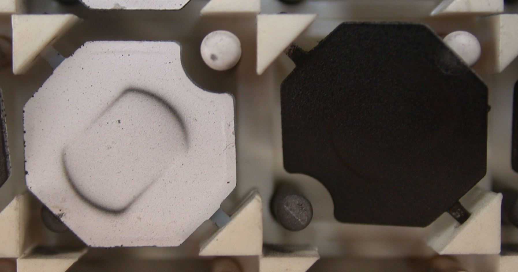 Flip Disc Elements / Bistabile Anzeigeelemente